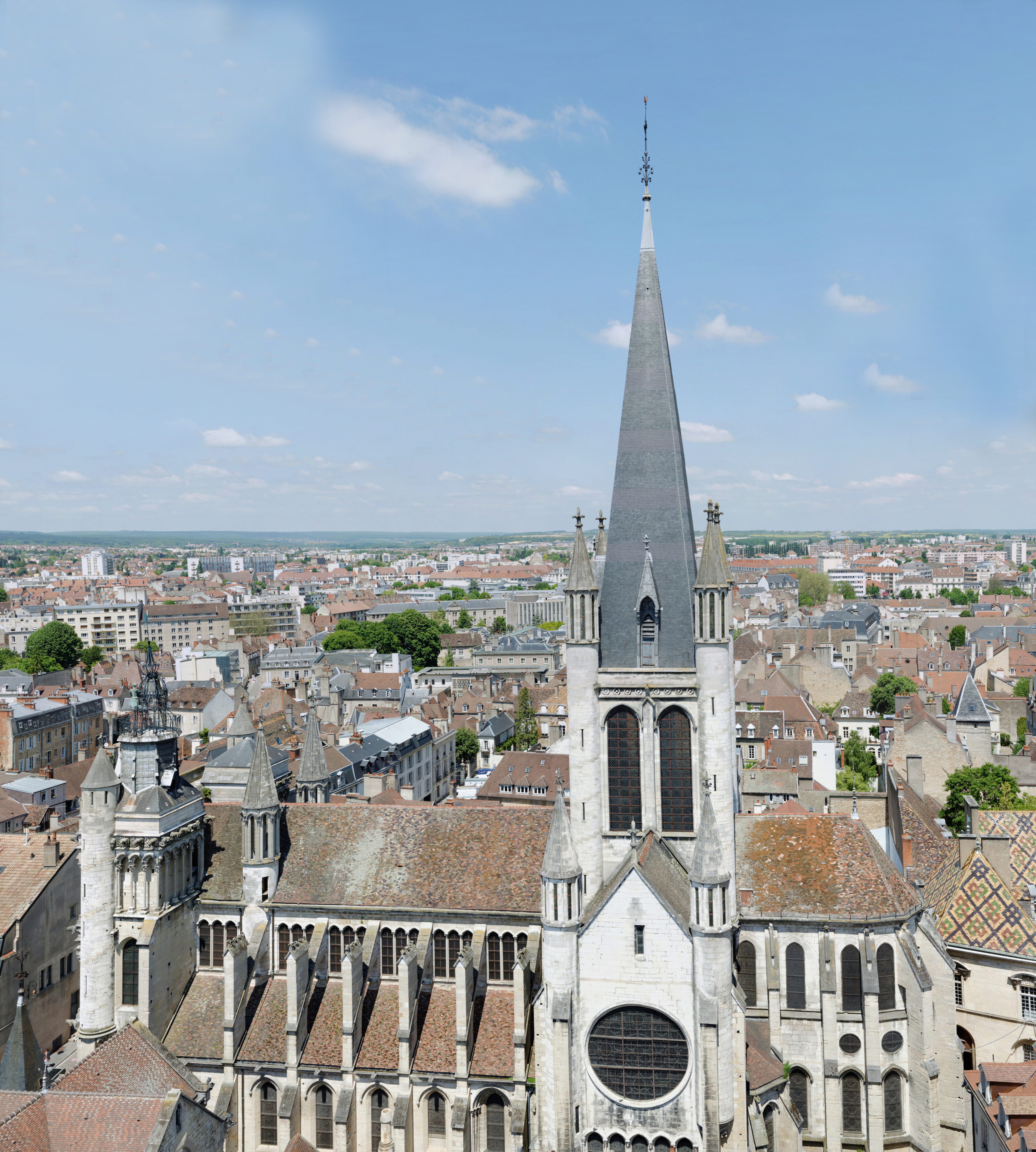 Vue de l’Église Notre Dame, depuis la tour Philippe le Bon, à Dijon